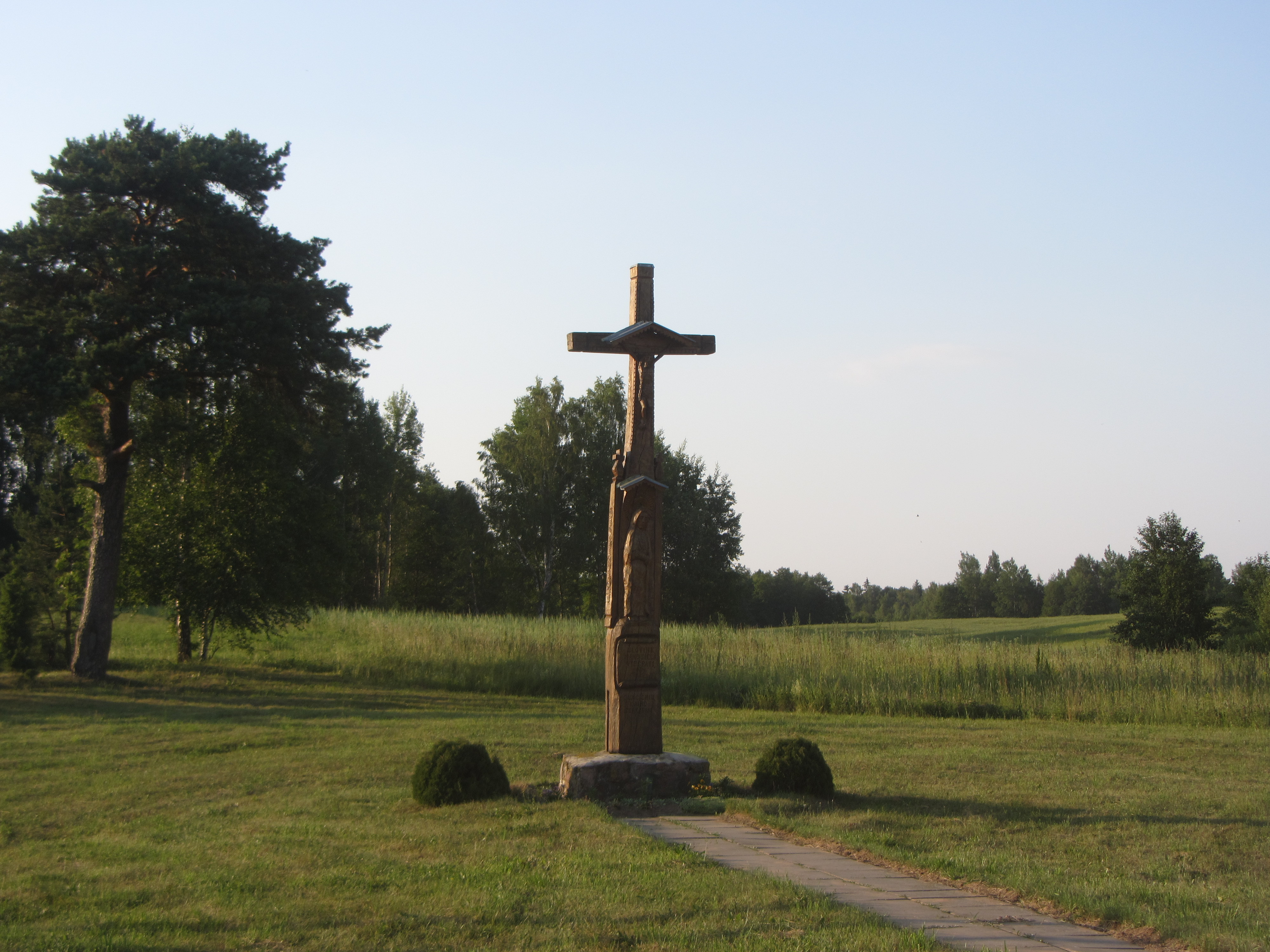 Junčionys 64485, Lithuania